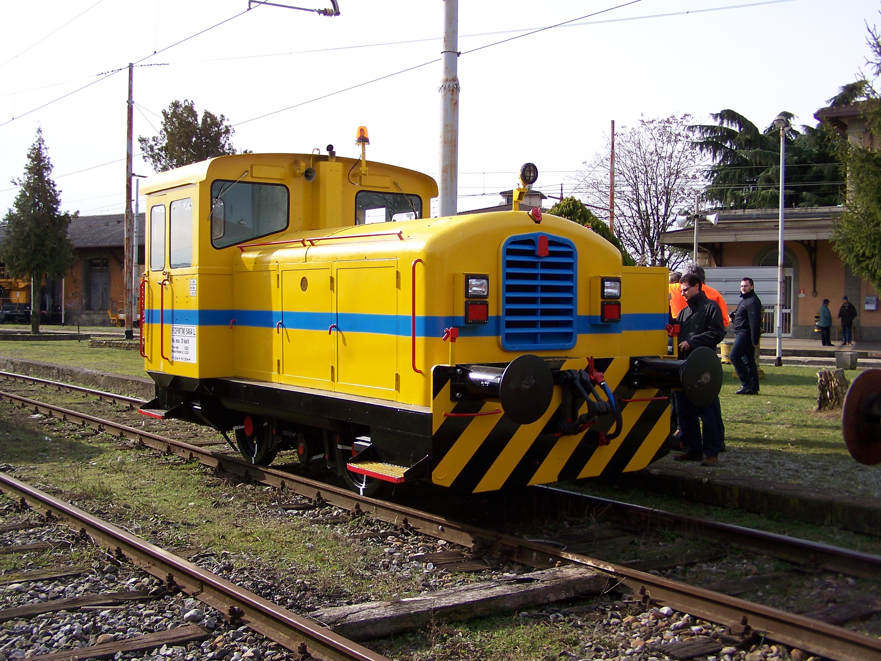 Il locomotore da manovra Badoni tipo ABL VI in esposizione presso il quarto binario della stazione di Palazzolo sull'Oglio durante la Terza giornata delle ferrovie dimenticate. Il locomotore è stato costruito nel 1964, battezzato dalla Ferrovie Turistiche Italiane come FBS 216.001, e restaurato nel 2010 da una società bresciana.